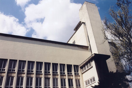 Collège Néerlandais, Cité internationale universitaire de Paris, XIVe arrondissement, Paris.